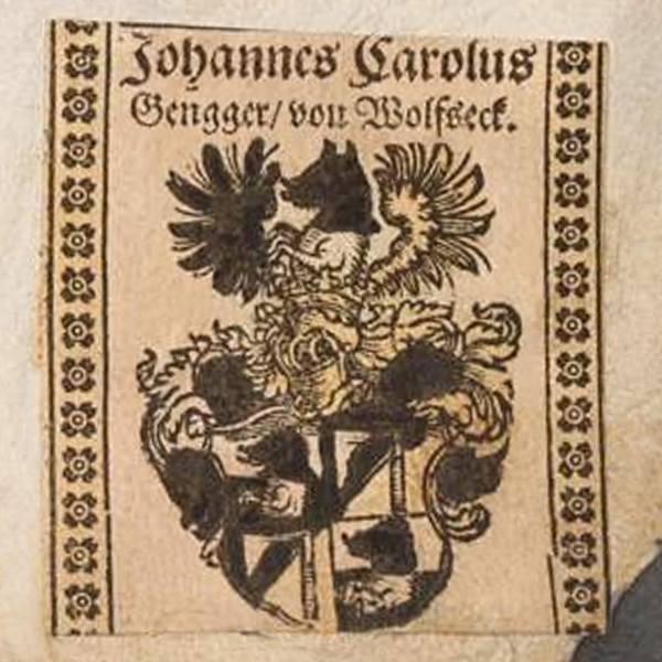 Wappen des Johannes Karl Gienger von Wolfseck - Wappensammlung - BSB Cod.icon. 307; Seite 375